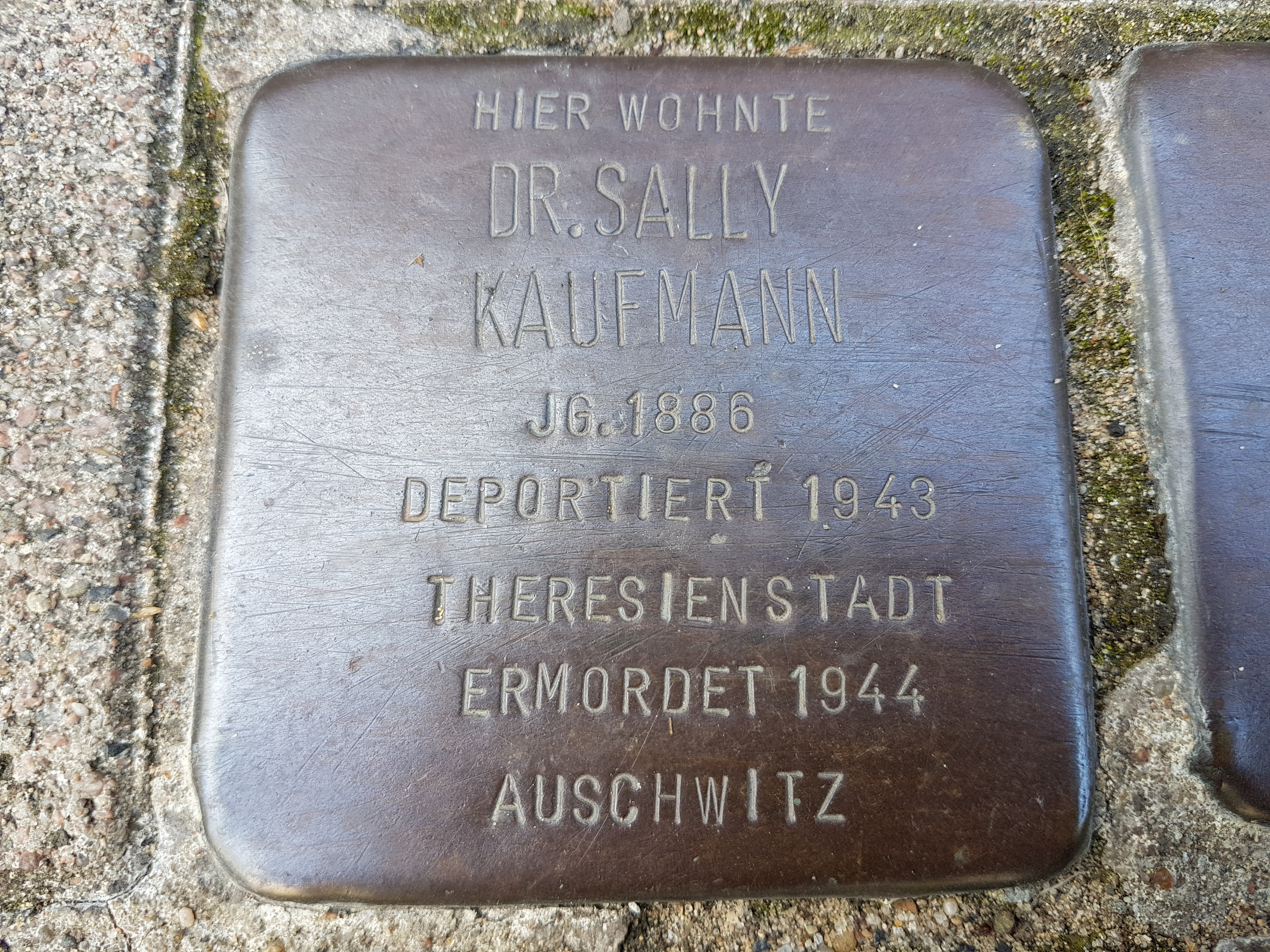 Stolperstein Duisburg Dr. Sally Kaufmann